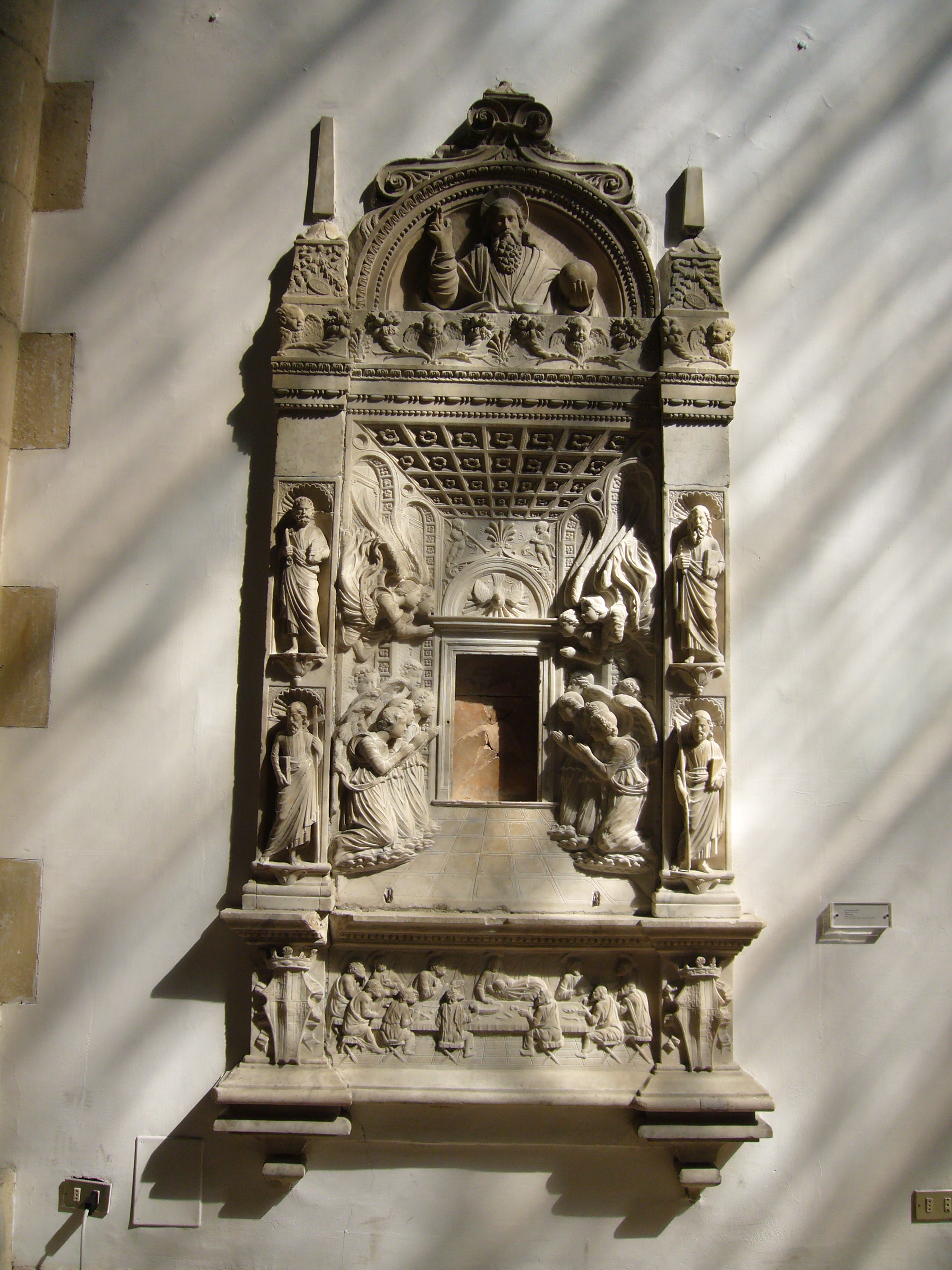 Napoli, cappella palatina in Castel Nuovo: tabernacolo (Domenico Gagini, XV sec.)